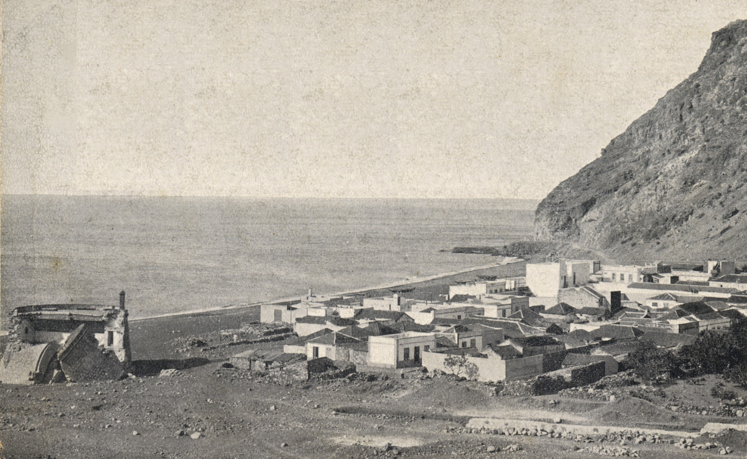 San Andrés, 1905 (Tenerife)